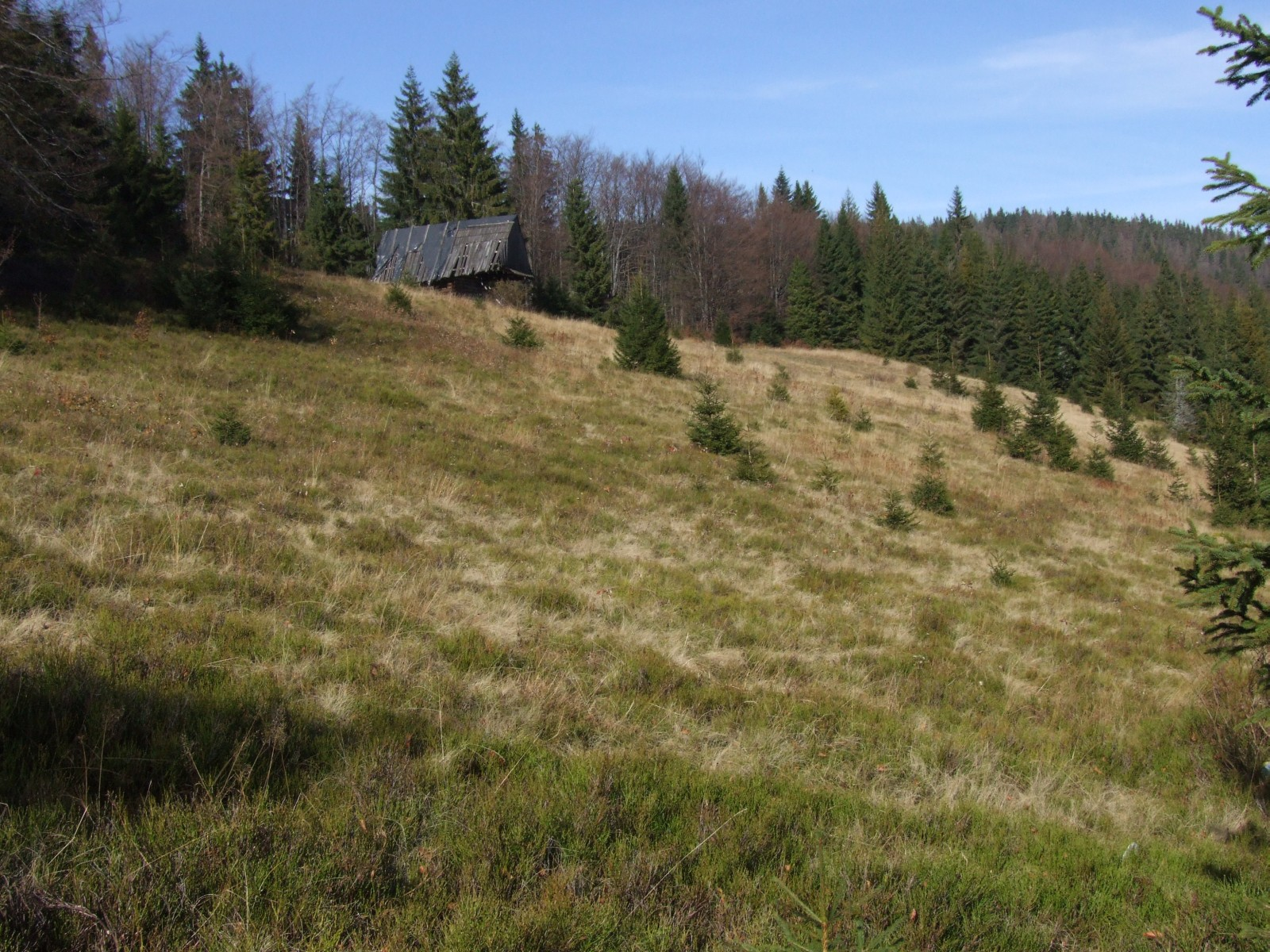 Polana Rąbaniska w Gorcach